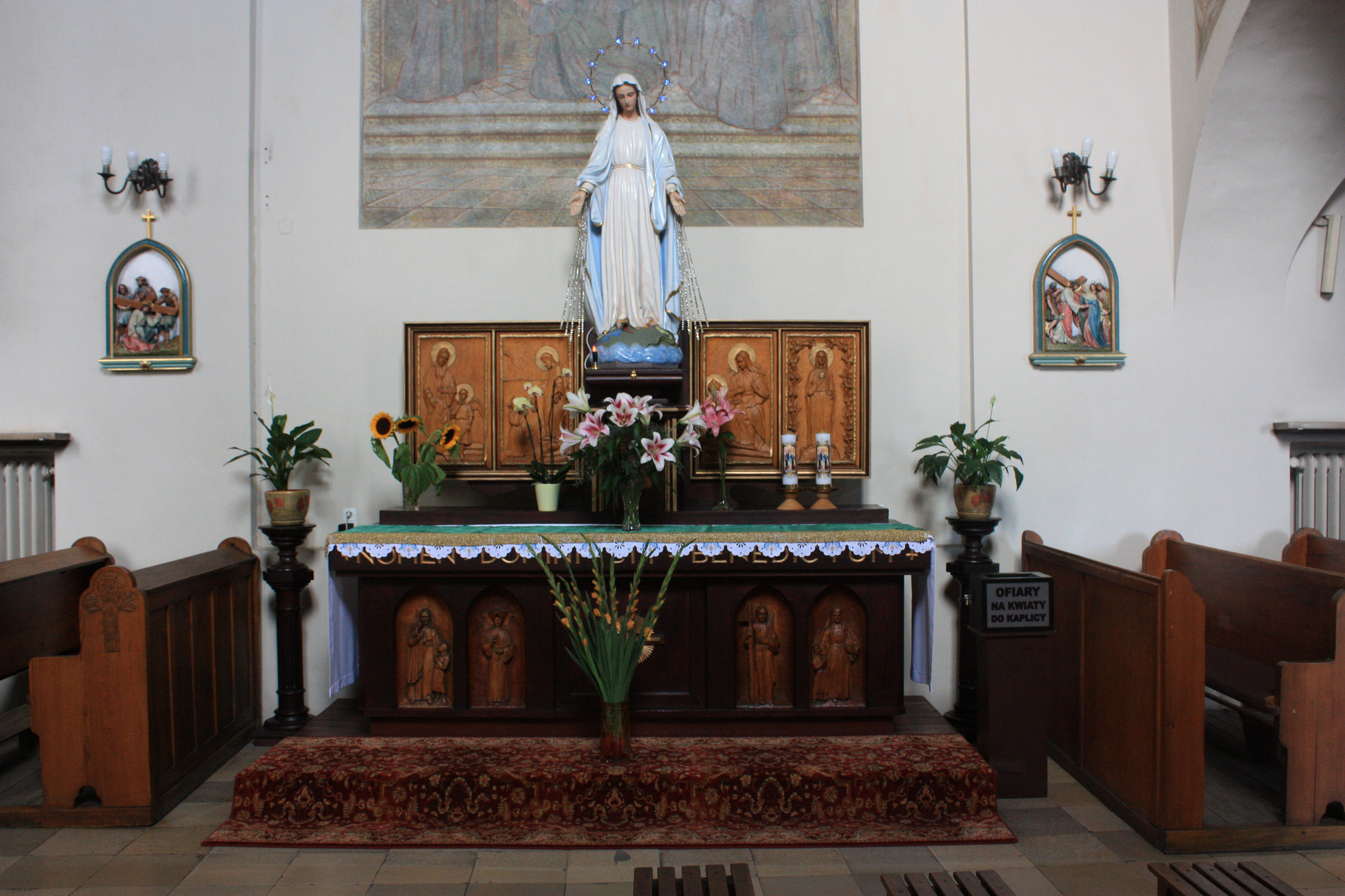 Kościół Przemienienia Pańskiego w Poznaniu. Ołtarz boczny.